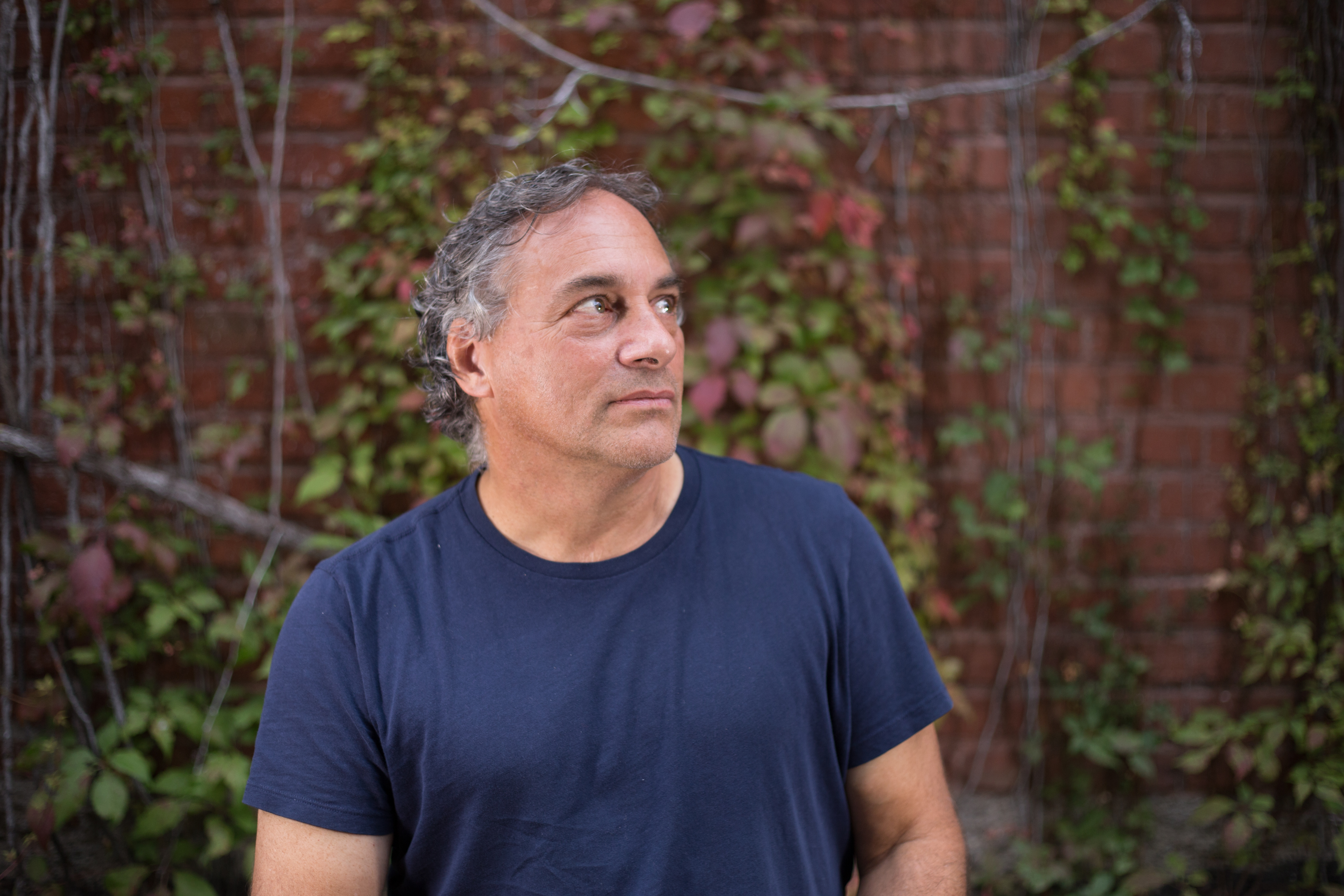 Portrait réalisé dans le cadre du 5 à 7 des Sommets du cinéma d’animation.